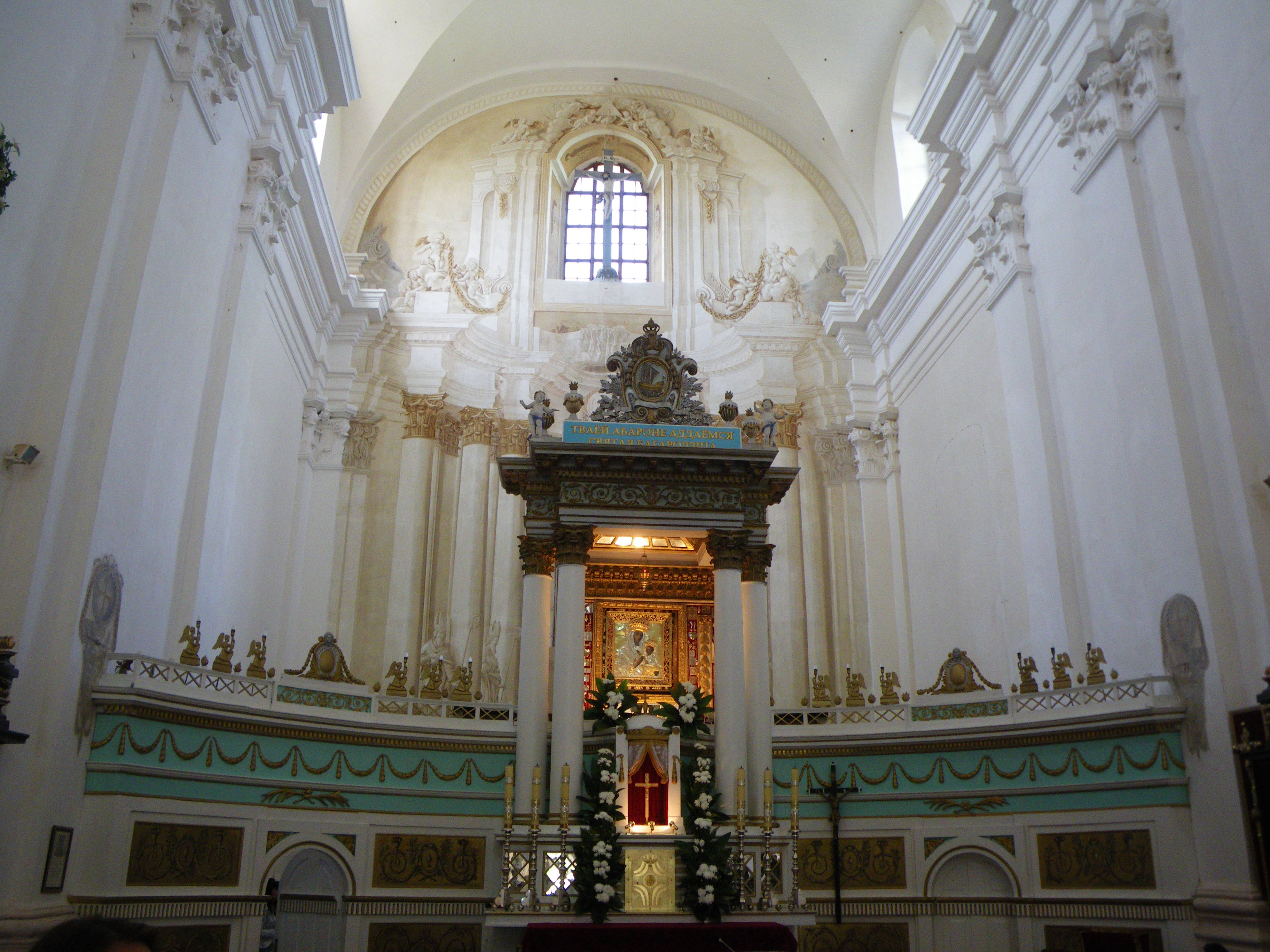 Беларуская (тарашкевіца): Комплекс былога кляштара бэрнардынцаў, дэкаратыўнае аздабленьне касьцёла: галоўны і бакавыя алтары росьпісы. в. Будслаў This is a photo of Belarusian heritage monument. Reference number: 611Г000422 ( WLM)